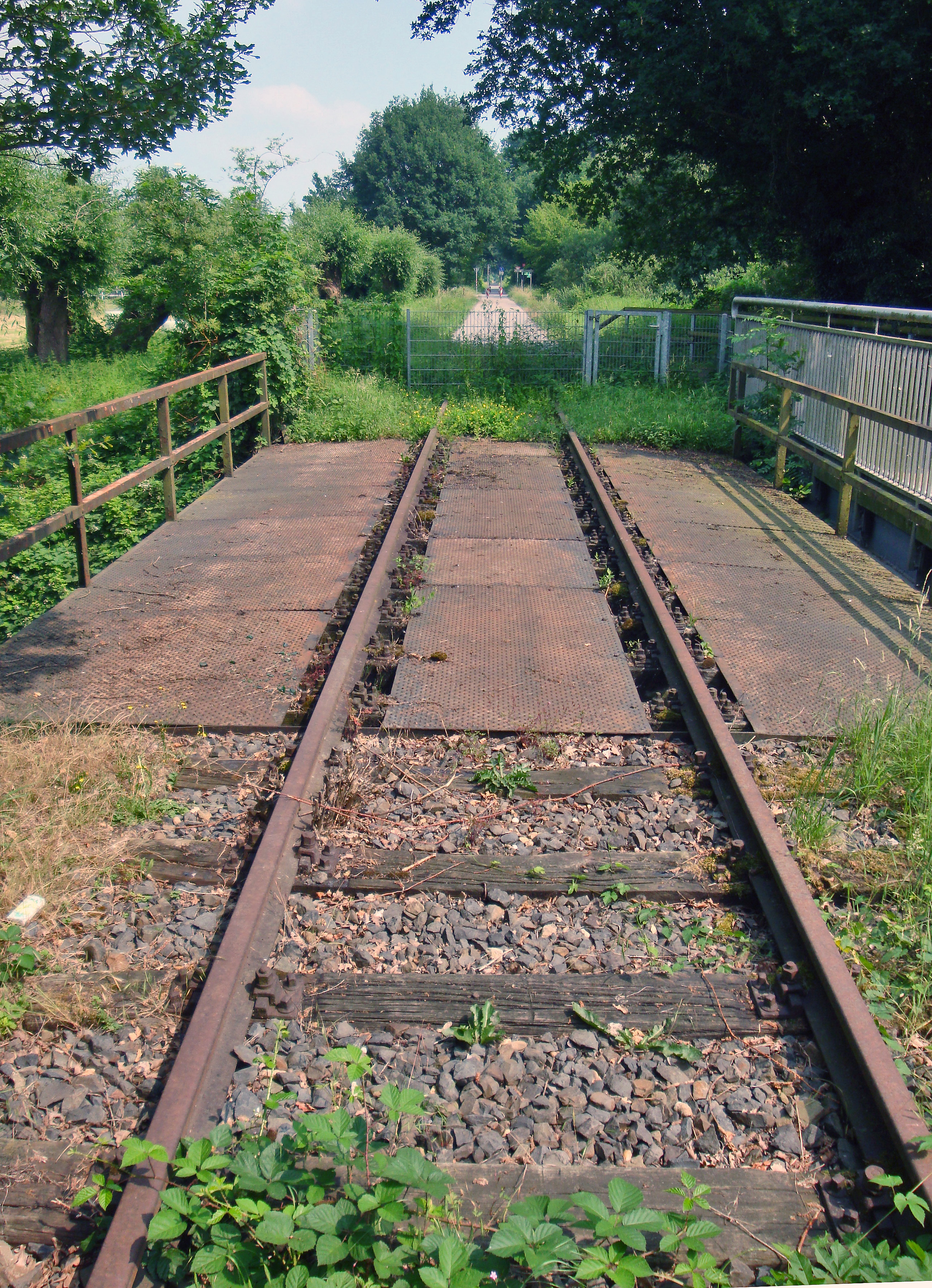 Der heutige Radweg mit der erhaltene Eisenbahnbrücke über die Nette (de Wittsee)